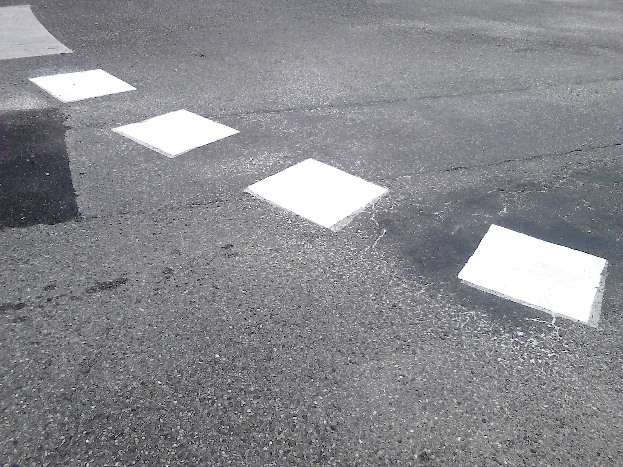 Marquage sur une route d'un cédez-le-passage avec microbilles de verre. Ville : Aix-les-Bains (73).